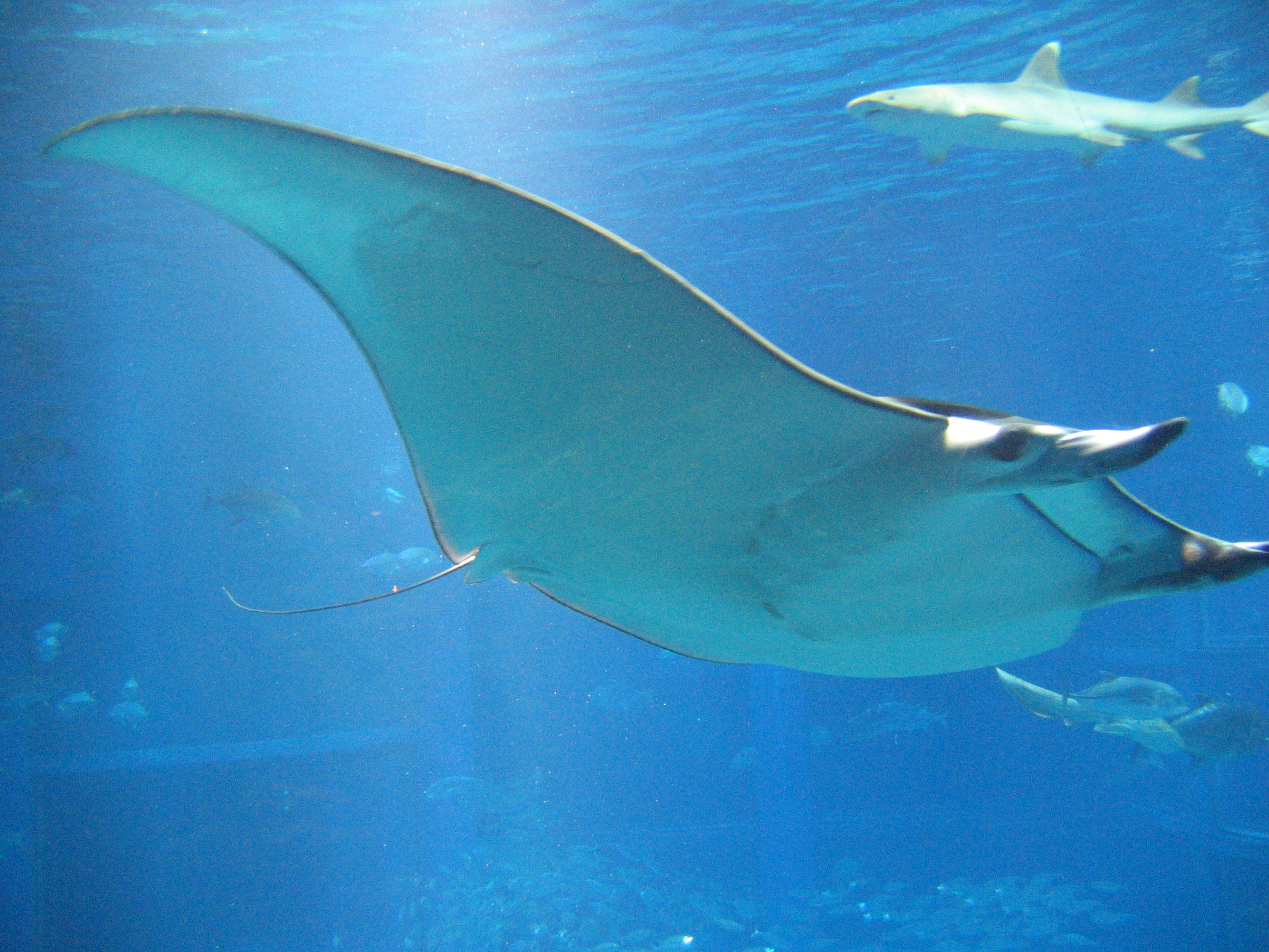 Spinetail mobula (Mobula japanica) at the Osaka Aquarium.